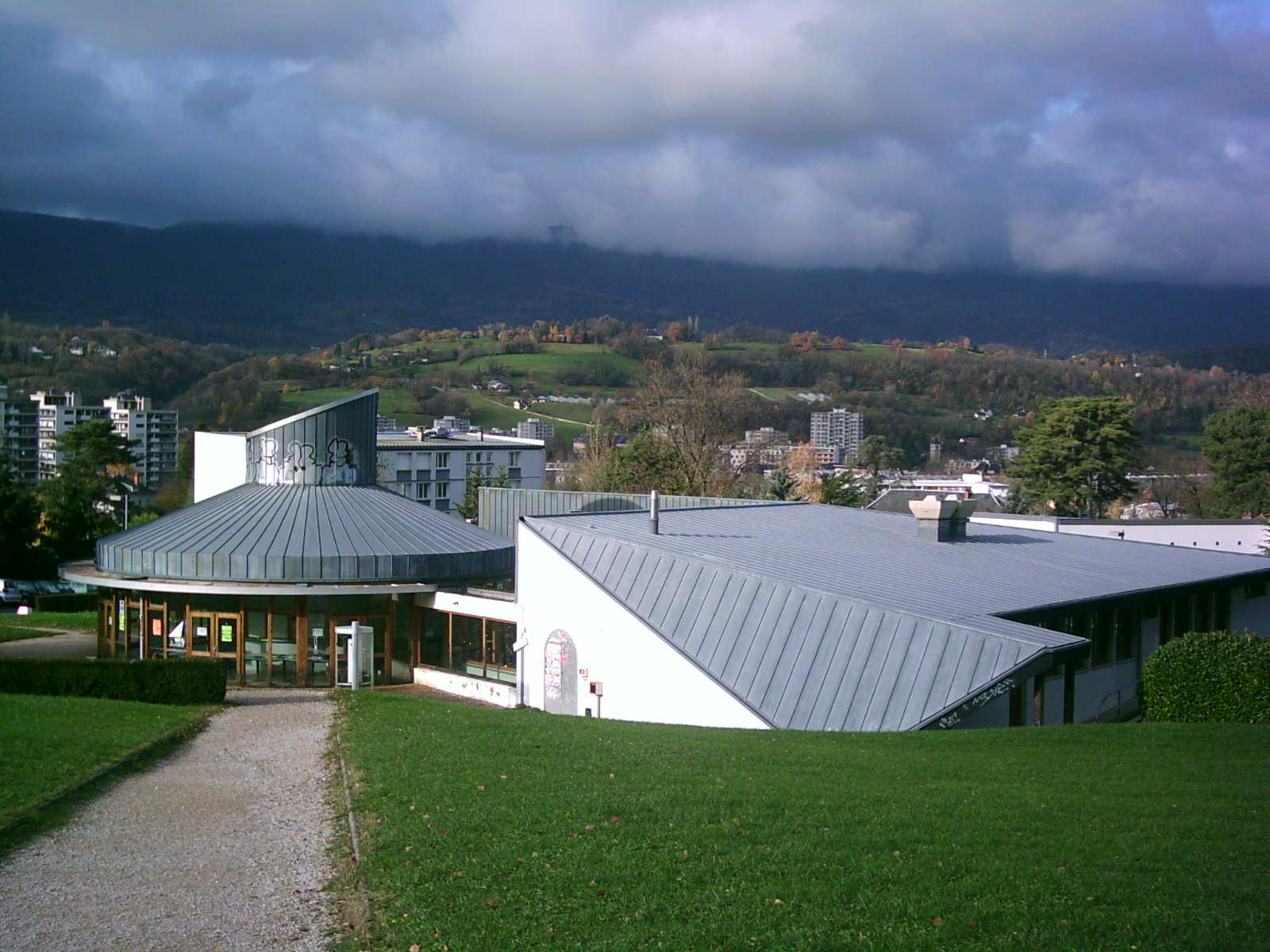 «Le satellite», café-restaurant de l'Université de Savoie, au faculté de Chambéry, novembre 2006.